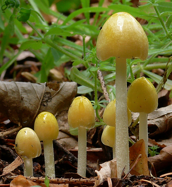 Goldmistpilze (Bolbitius vitellinus)